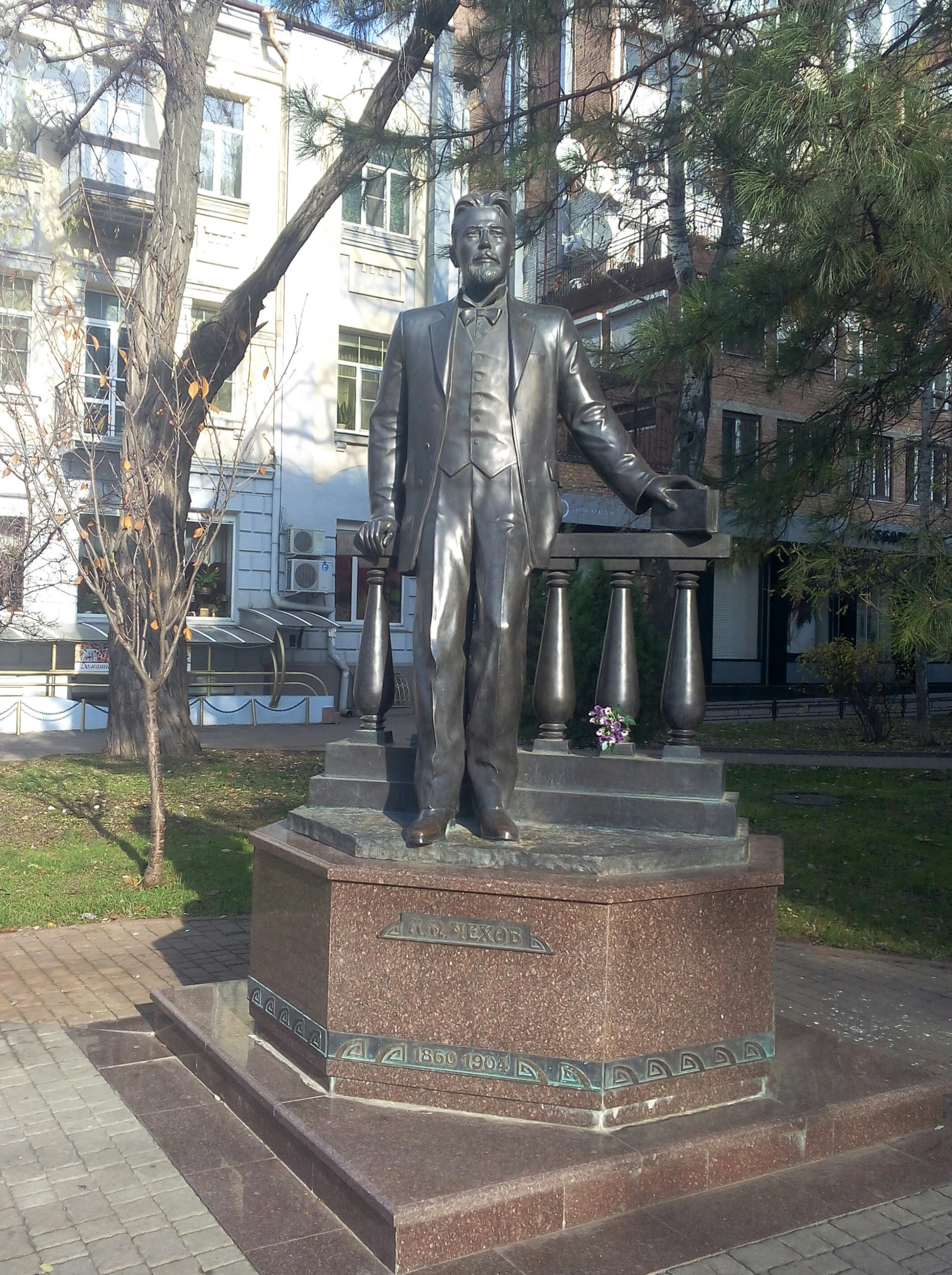 г. Ростов-на-Дону, памятник А.П. Чехову (проспект имени А.П. Чехова)